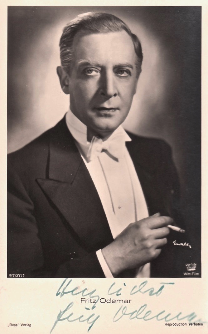 Der deutsche Theater- und UFA-Filmschauspieler Fritz Odemar (1890–1955), Künstlerpostkarte mit Original-Autograph